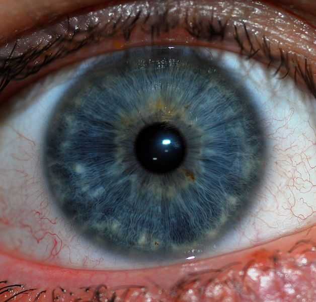 İris